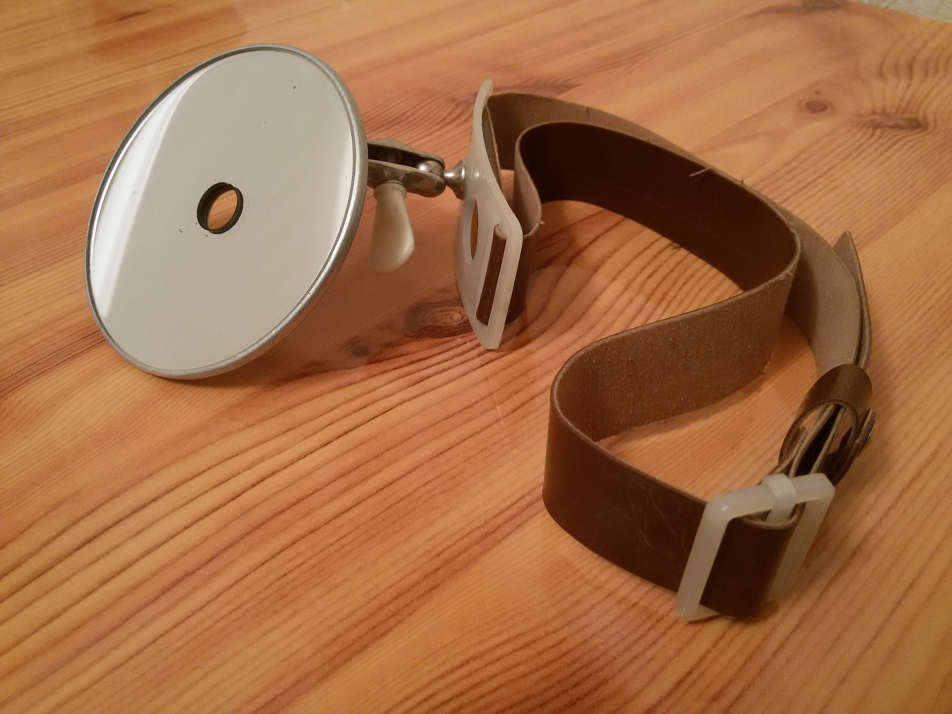 Рефлектор налобный. СССР, 1983 год.